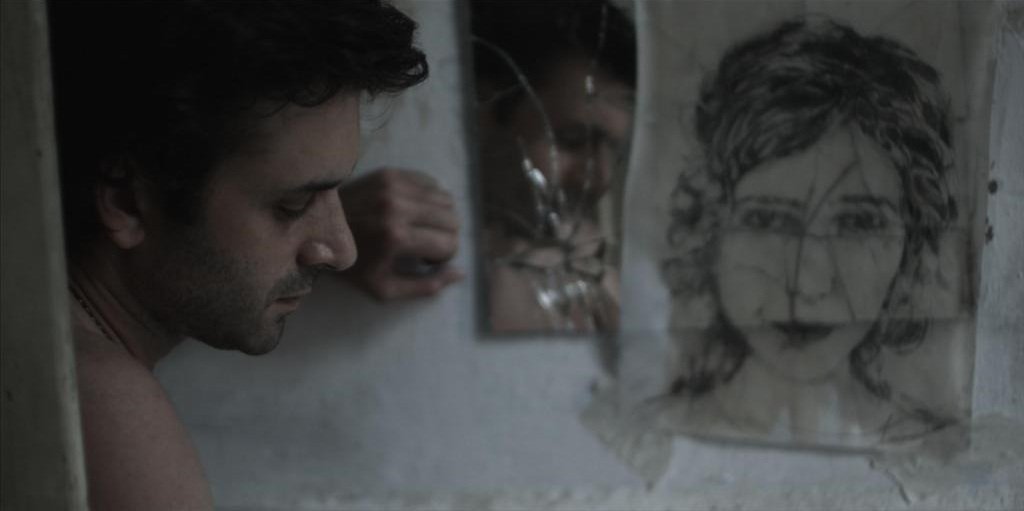 גיא לואל ב"יותר איטי מלב", סרטם של ינאי גוז ויוני זיכהולץ, 2012